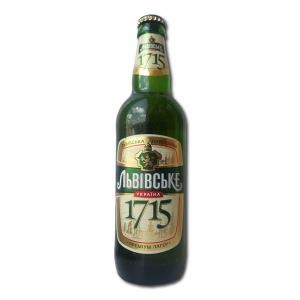 Birra di Lviv (Ucraina)